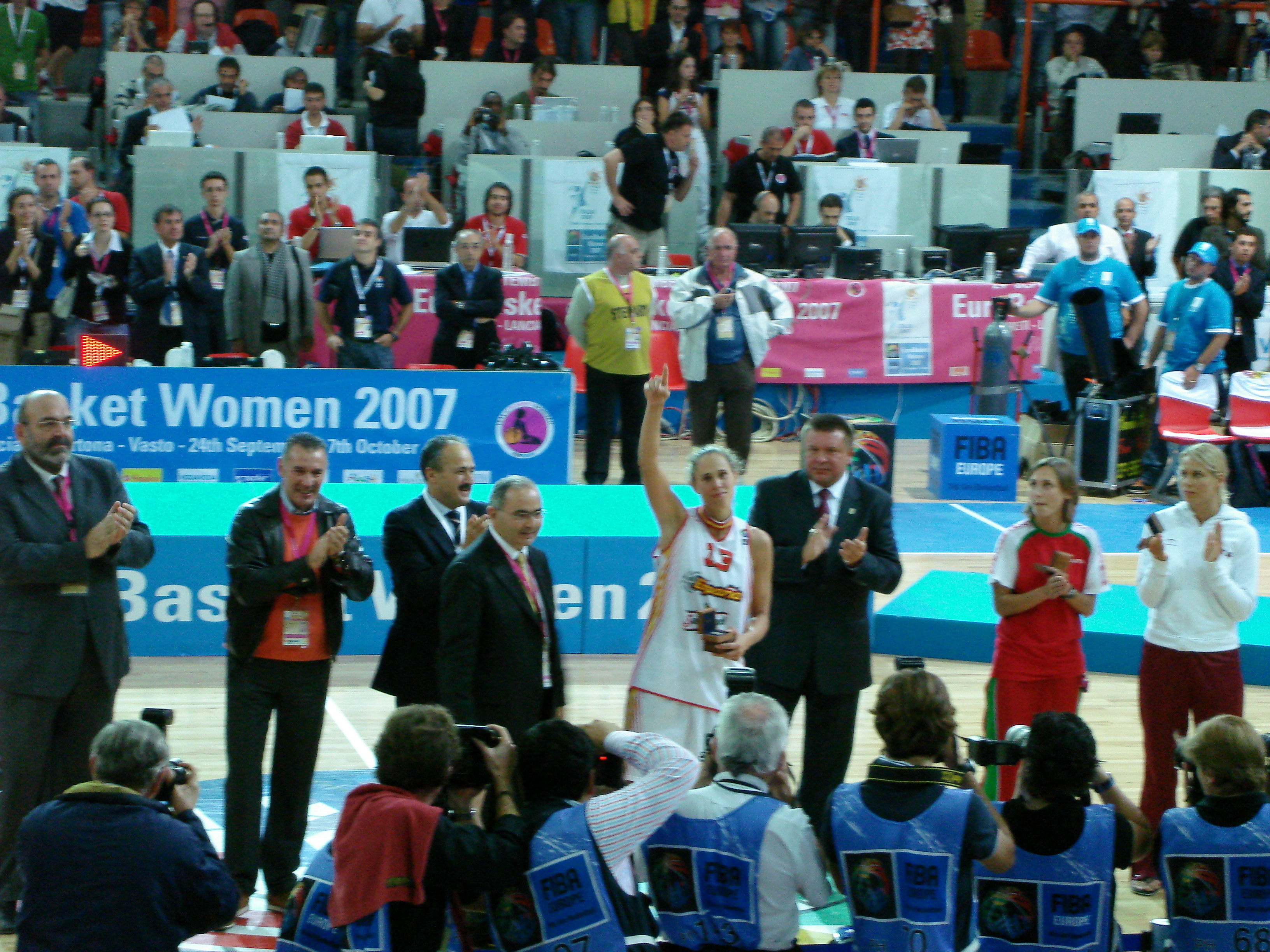 FIBA EuroBasket Women 2007 - Final - Valdemoro MVP